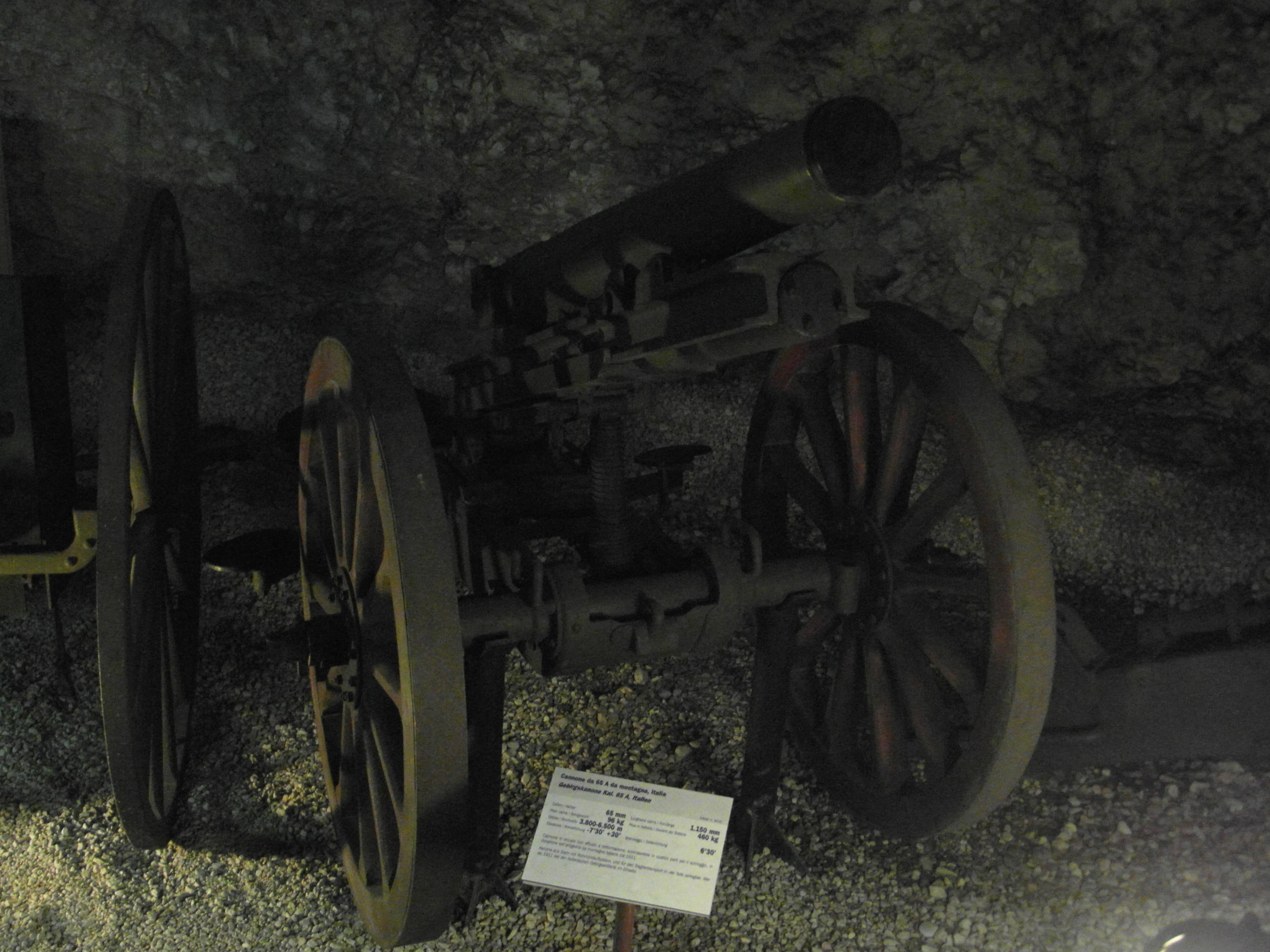 Museo storico italiano della guerra - Cannone da 65/17 modello 13